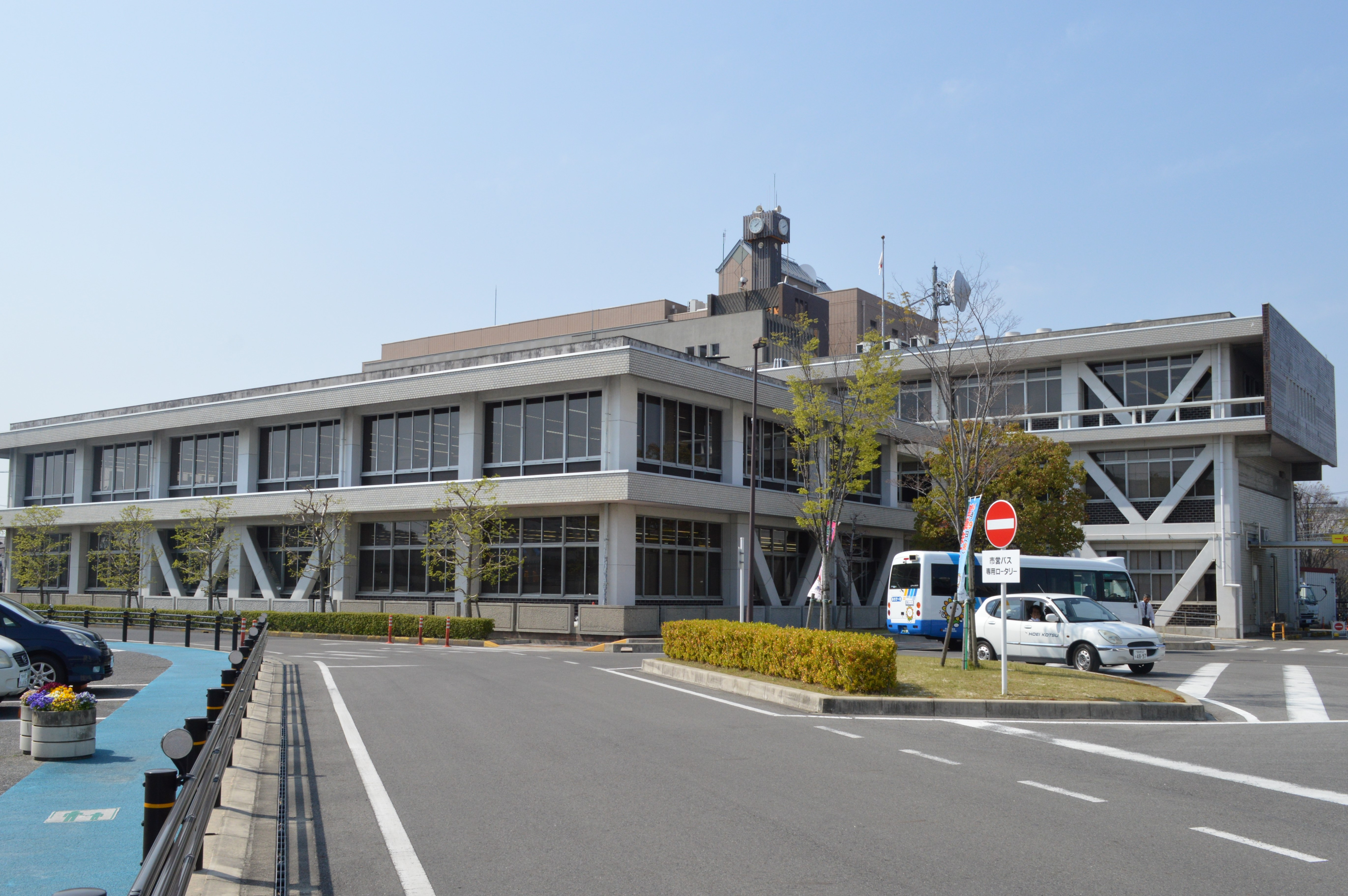 愛知県尾張旭市の尾張旭市役所。